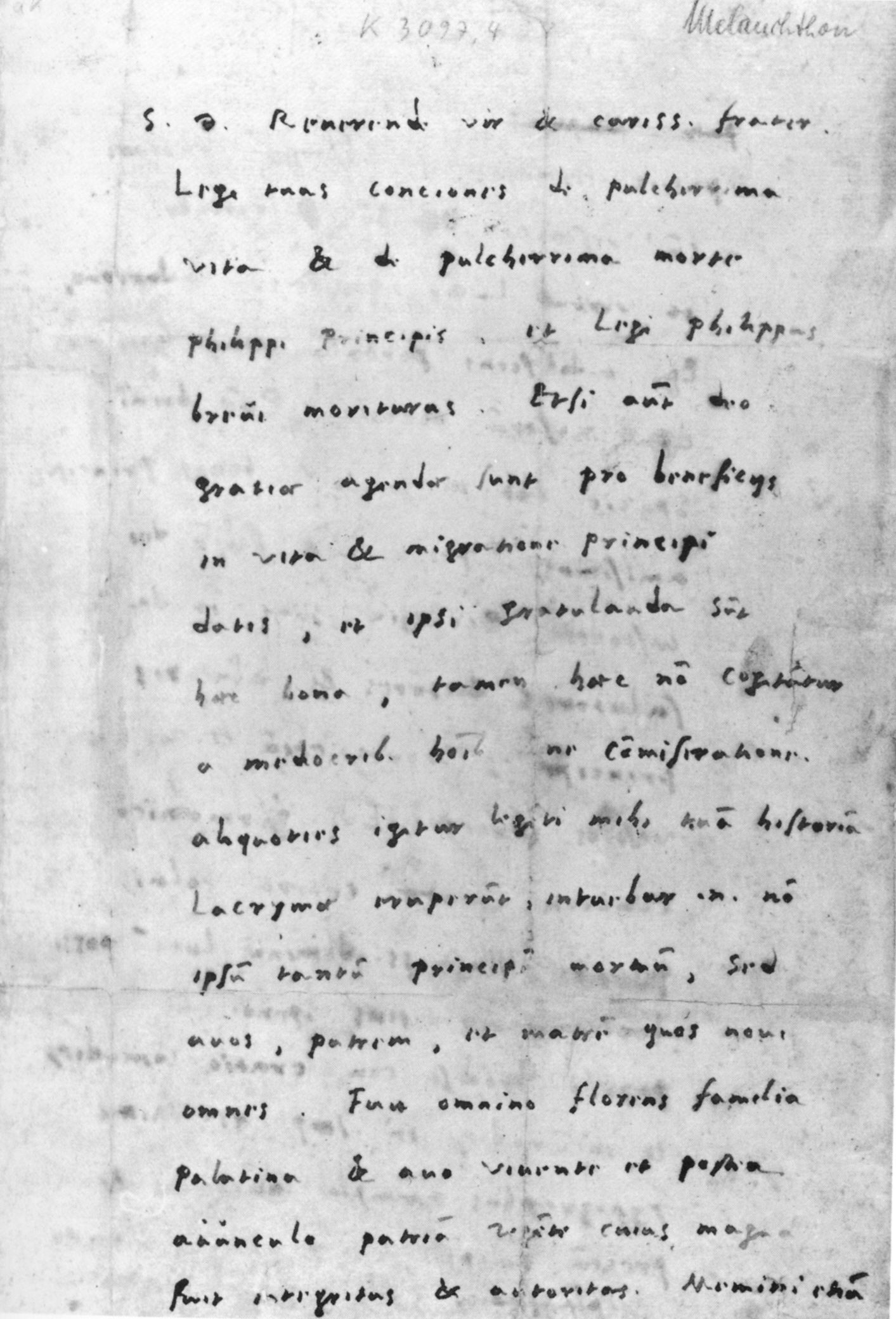 Erste Textseite des lateinischen Briefs Philipp Melanchthons aus Wittenberg (14. April 1560, fünf Tage vor seinem Tod), an den pommerschen Superintendenten Jakob Runge Badische Landesbibliothek, Hs. Karlsruhe 3097,4